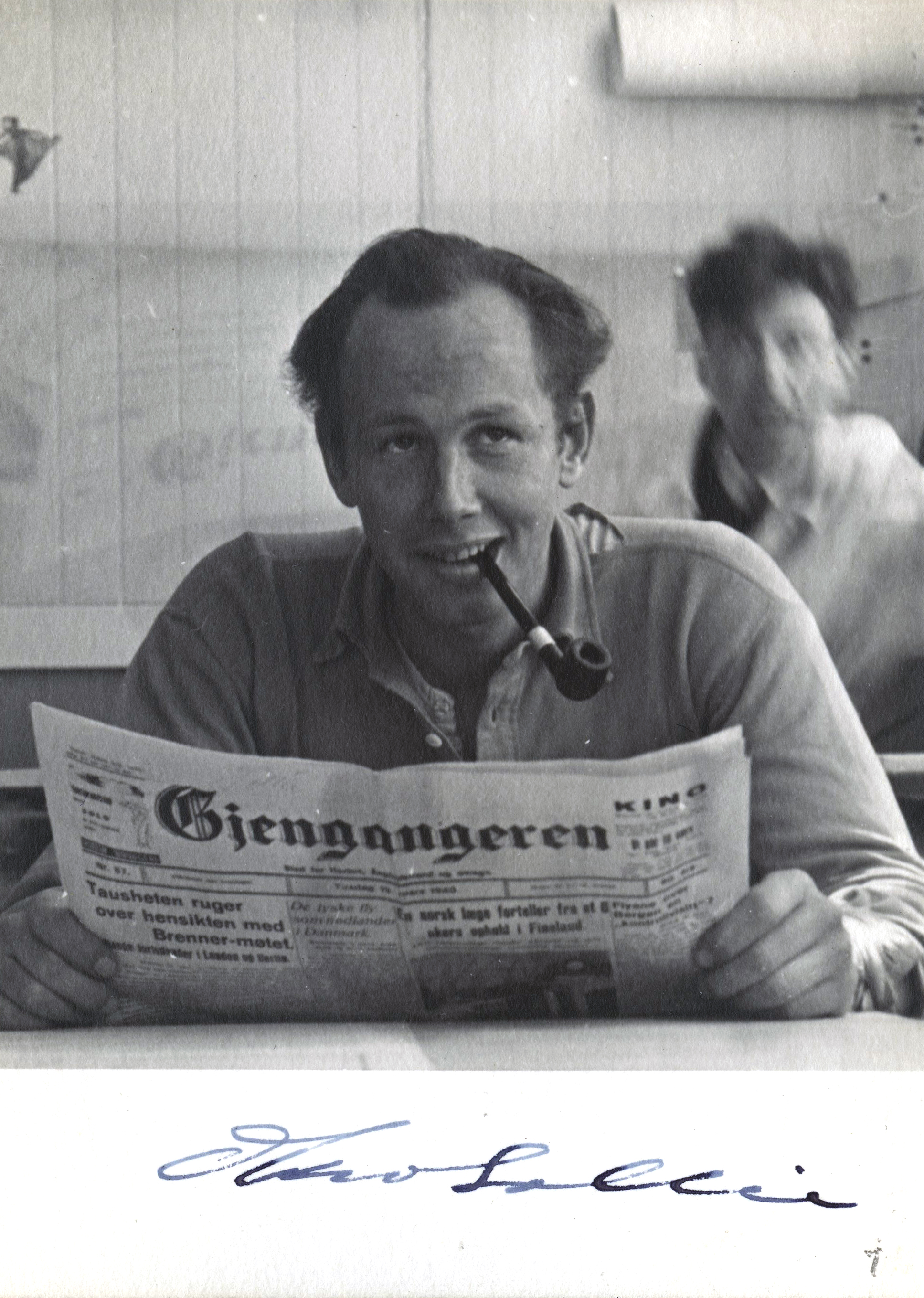 Format: Fotopositiv Dato / Date: Ca. 19 Mars 1940 Fotograf / Photographer: Ukjent, mulig Johan Eggen Sted / Place: NTH, Trondheim Wikipedia: Regiment Nordland Eier / Owner Institution: Trondheim byarkiv, The Municipal Archives of Trondheim Arkivreferanse / Archive reference: Tor.H42.B58.F4216 Merknad: Fra Johan Eggens privatarkiv. Johan Eggens notat til bildet: "Regiment Nordland, 'falt i kampen mot bolsjevismen'" Sollie, Olav, f. 23. 1. 1916 på Jeløy, d. 19. 10. 1941 under krigen, sønn av gårdbruker Halvard S. og Maria Myhre. B.ing. NTH 1940. Bassøe, Bjarne: Ingeniørmatrikkelen Norske Sivilingeniører 1901-55 med tillegg (Oslo 1961)